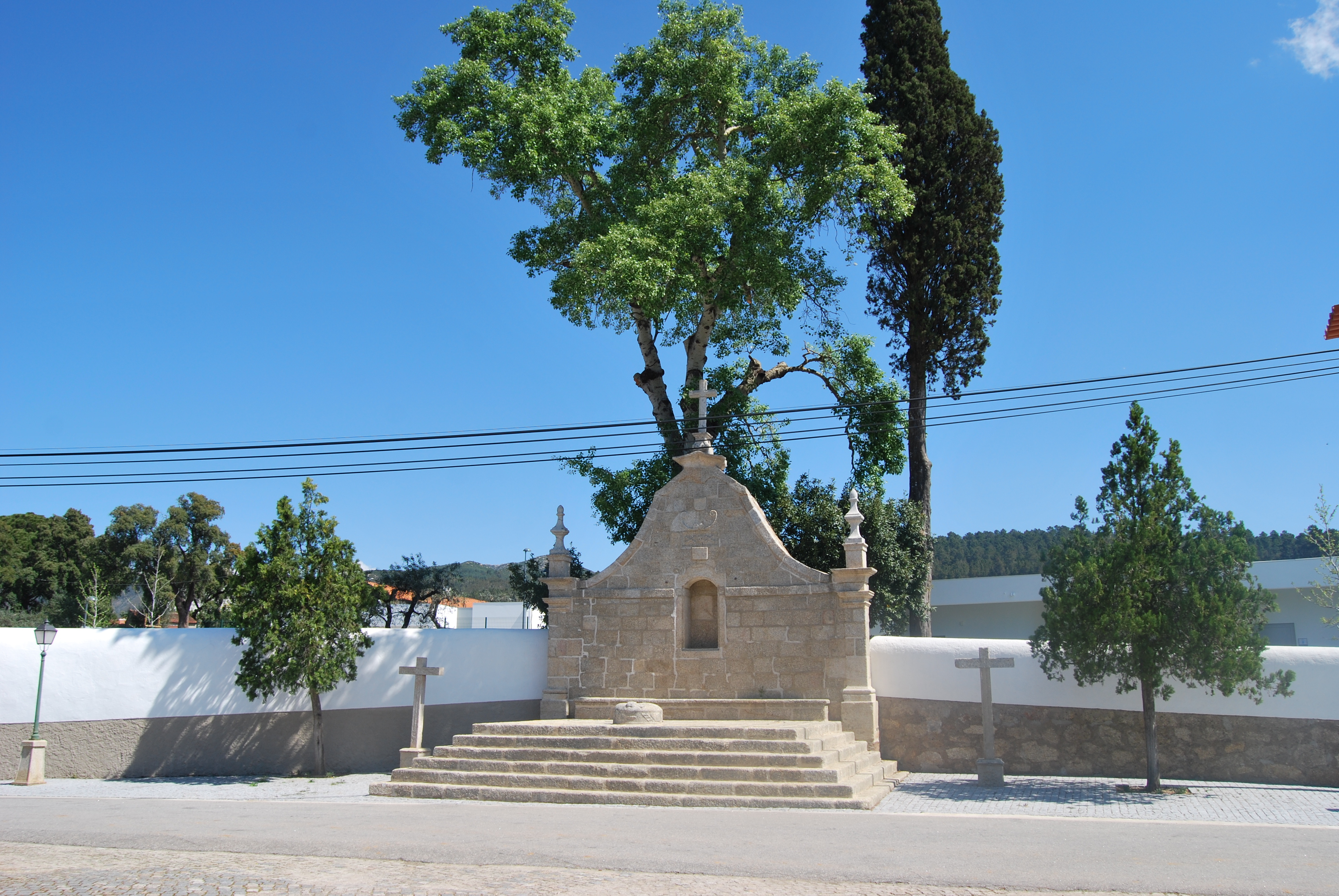 Calvário ou Gólgota é o nome dado no qual Jesus foi crucificado.